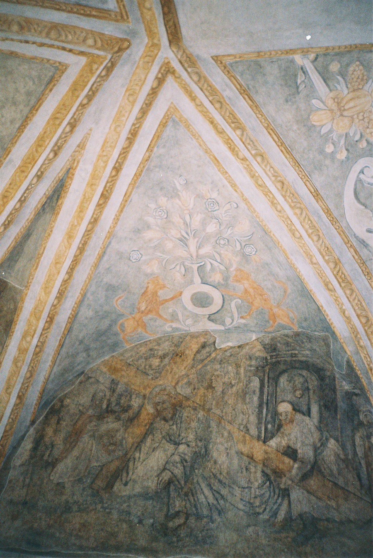 wnętrze kamienicy Gruszewiczów 2